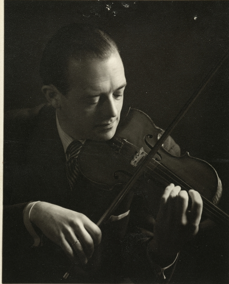 Øivind Bergh, 1945. Påskrift: "Til Arvid! Takk for alle de glade studer du har vendt meg i "graven". Øivind.""